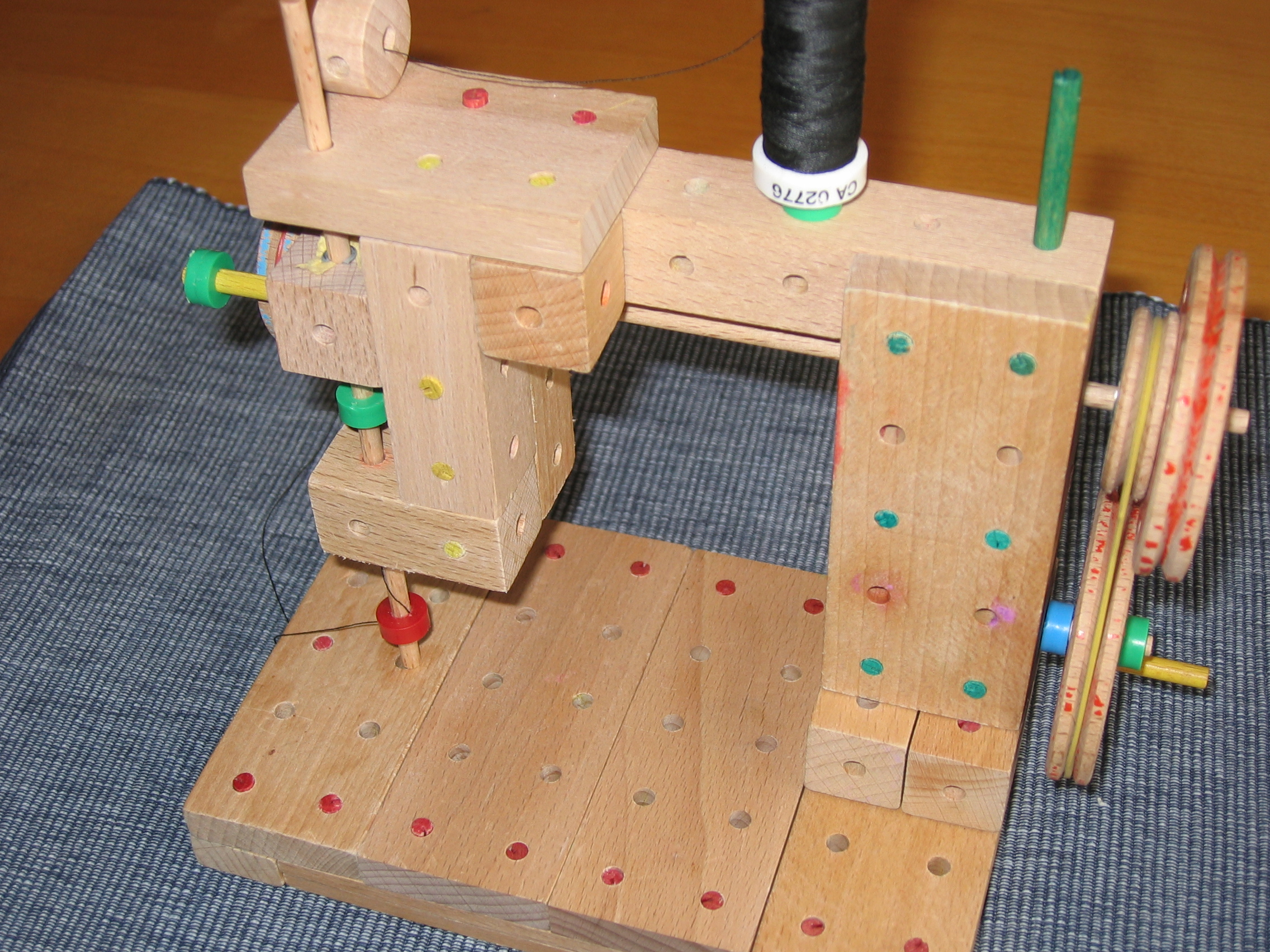 Eine Nähmaschine als Matador-Modell